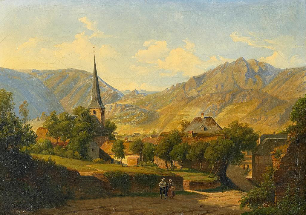 Mayschoss an der Ahr